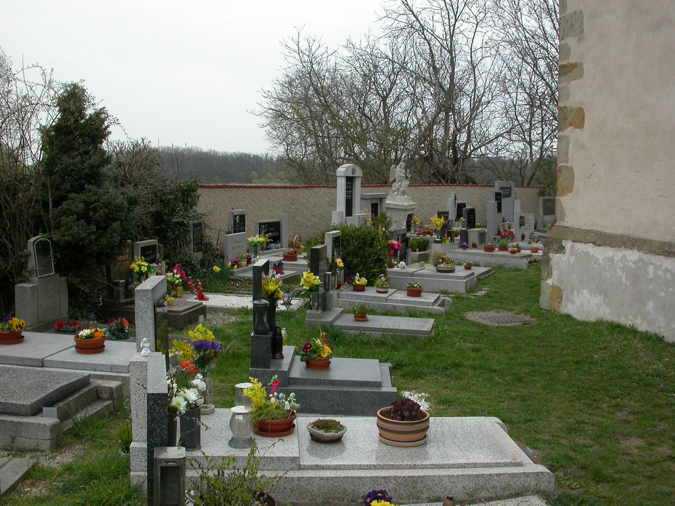 Hřbitov, při kostele sv. Jakuba v Libiši.